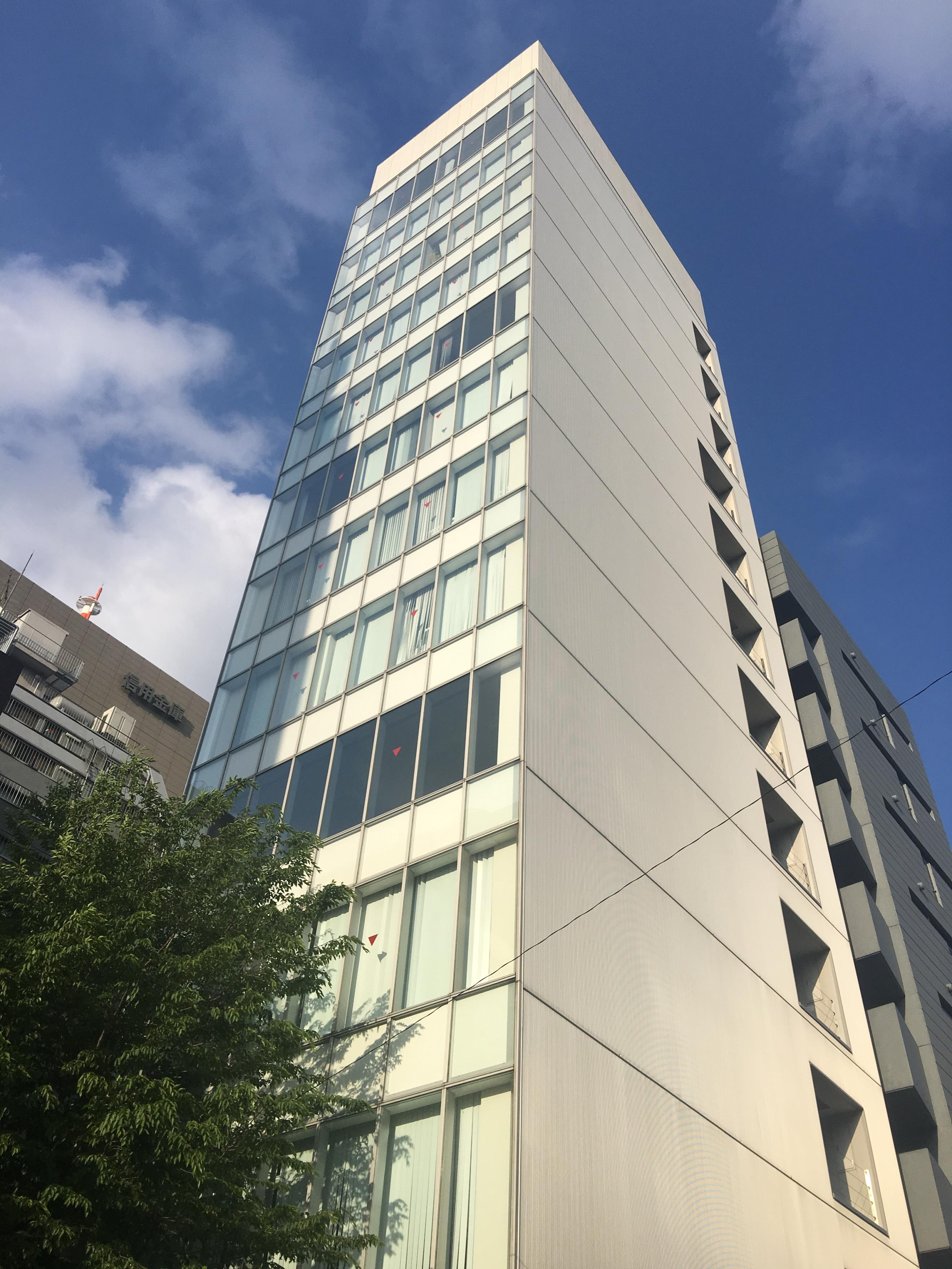 染野屋本社入居オフィスビル